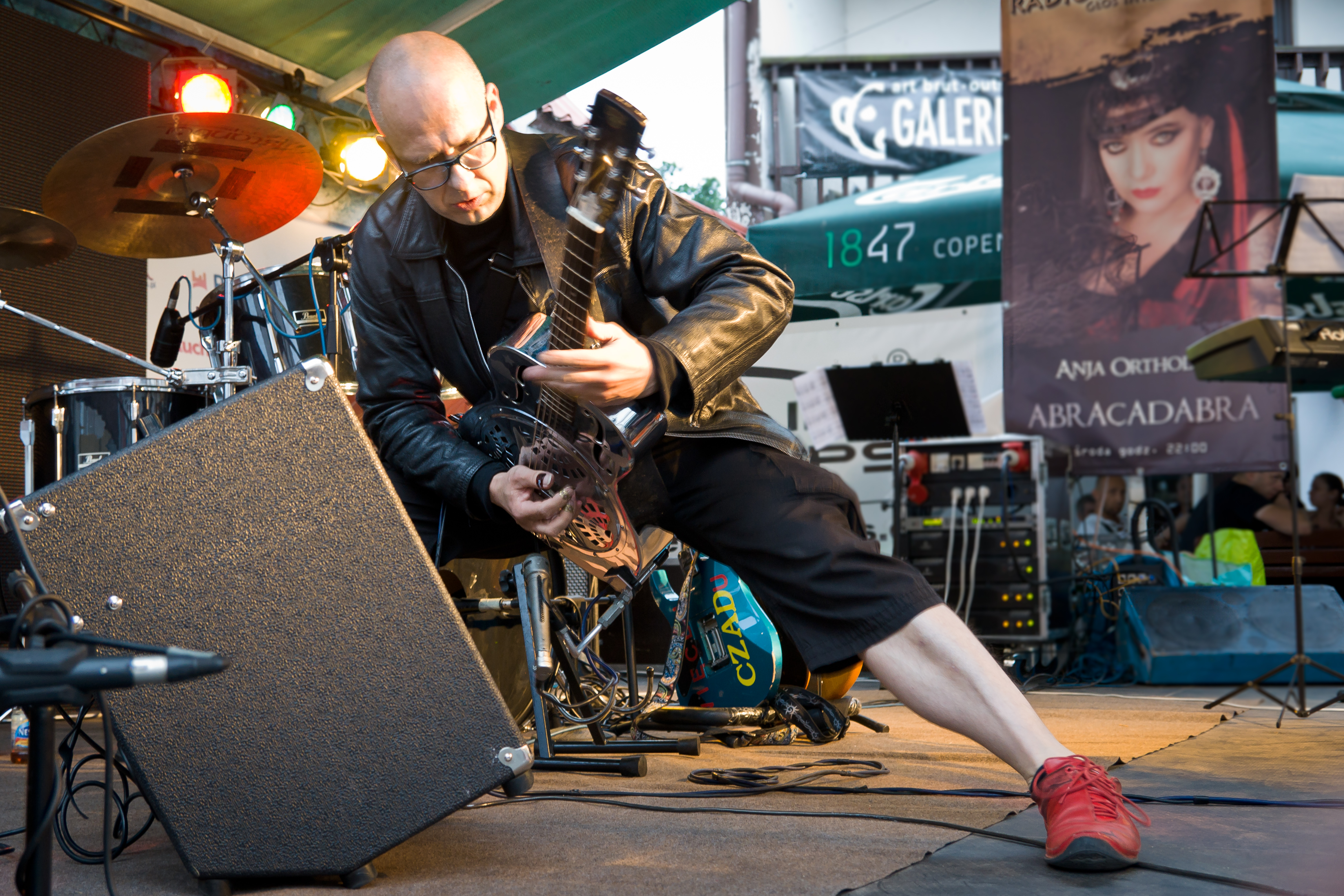 Roman Puchowski podczas solowego koncertu w pubie Rock'69. Zakończenie warsztatów instrumentalnych Rockowe Ogródki, 13. lipca 2012, Płock.